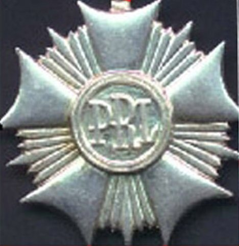 Order Sztandaru Pracy revers